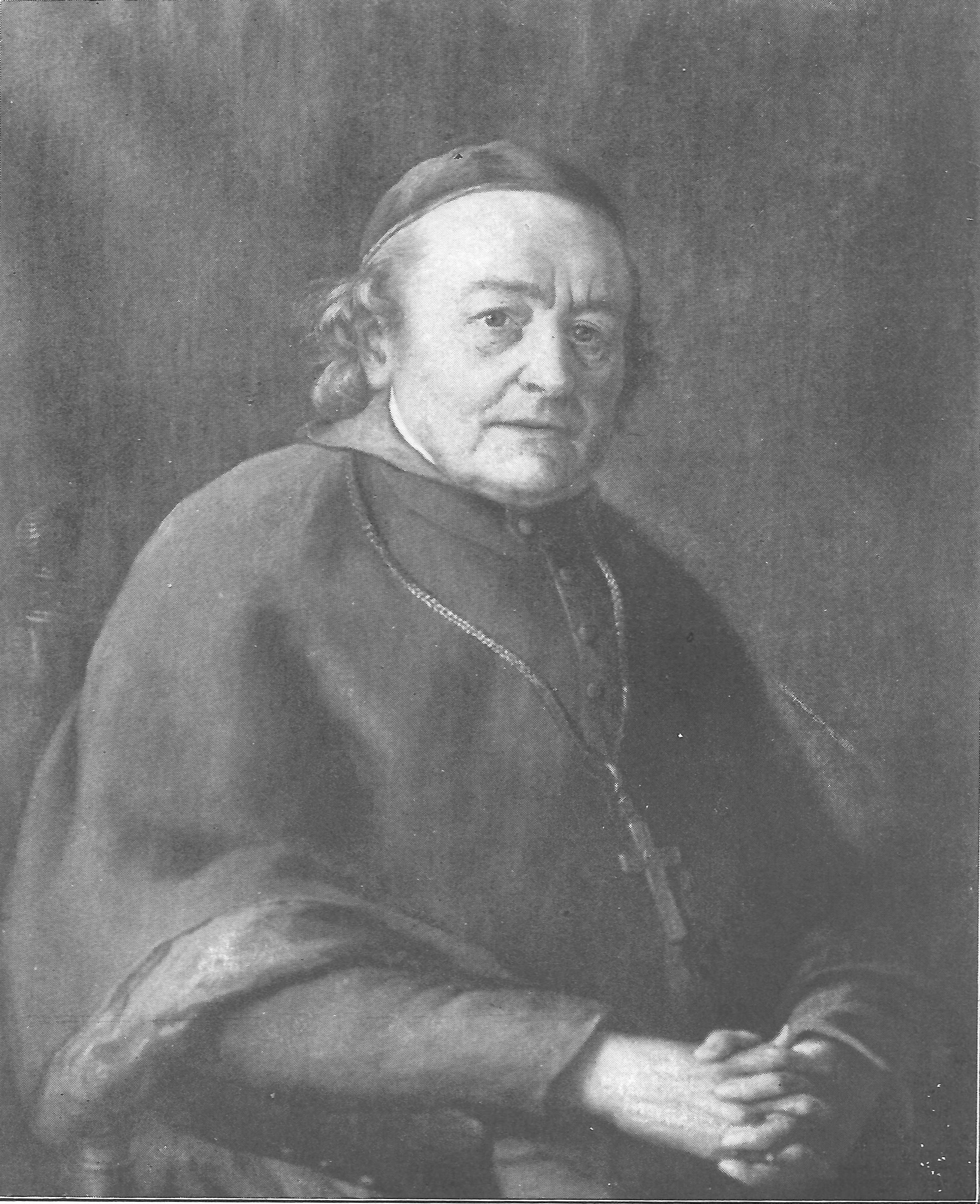 Porträt in der Tübinger Professorengalerie